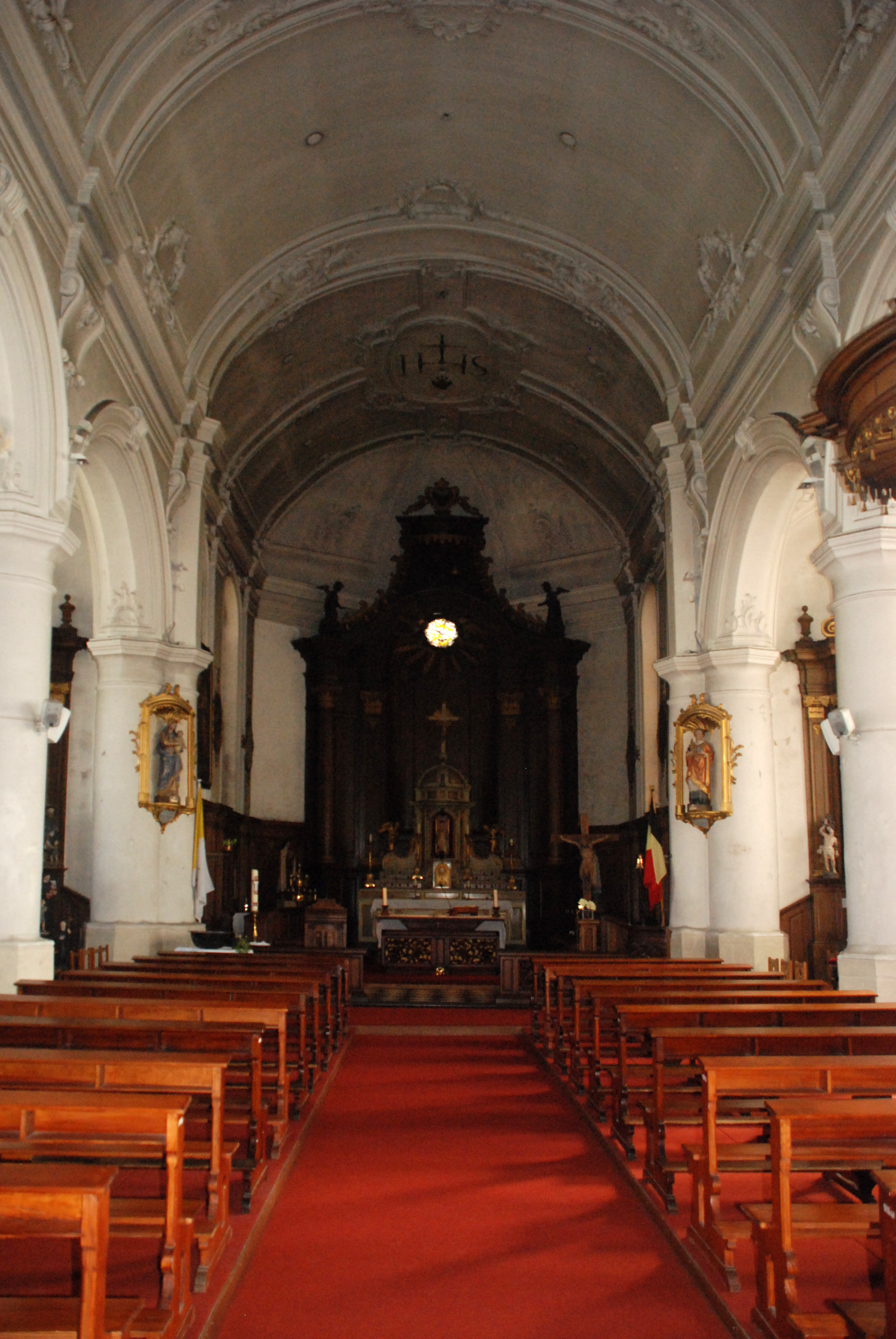 Belgique - Brabant Wallon - Lasne - Église Saint-Étienne d'Ohain